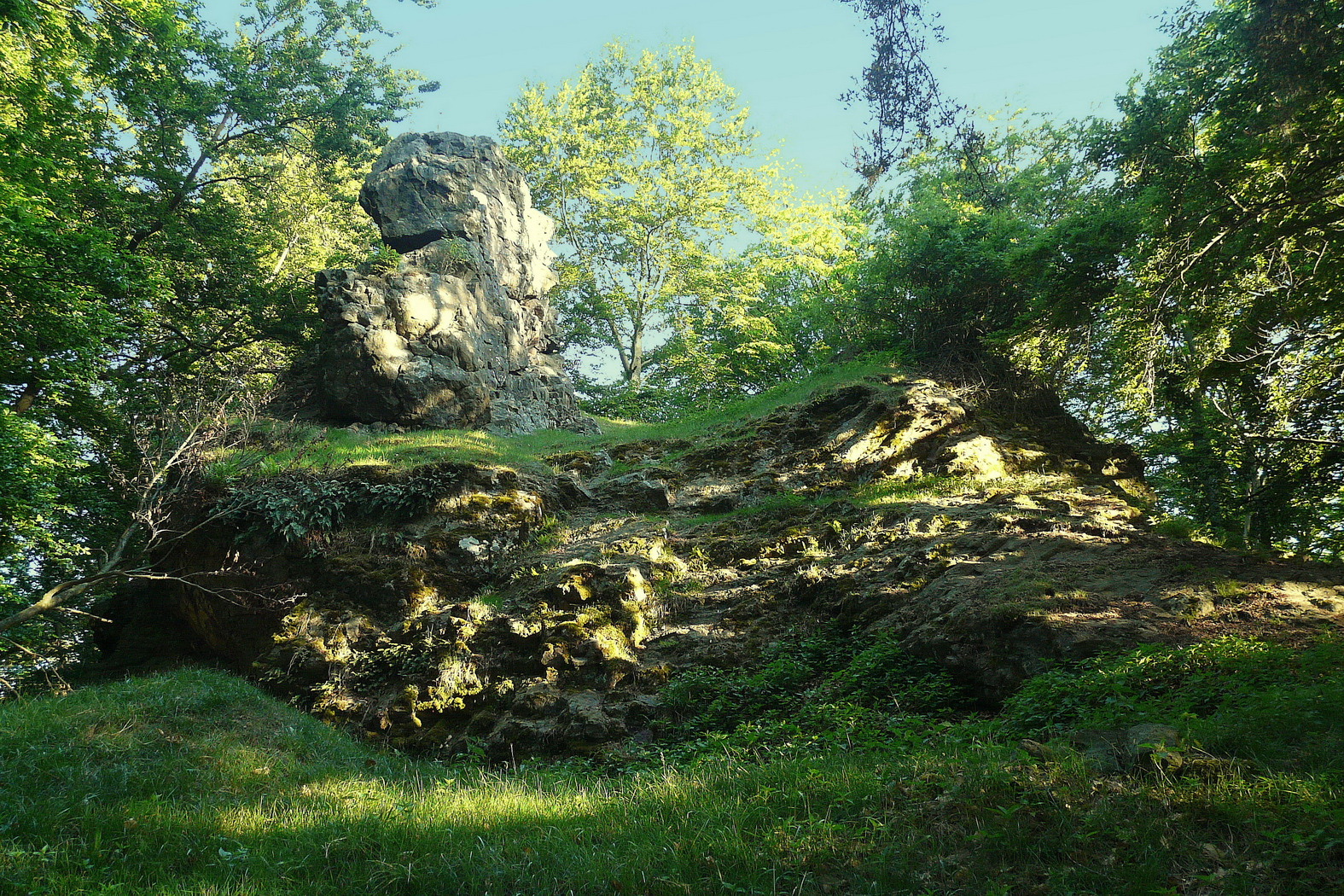 Sopečná skála na západním Slatinném vrchu (mrazový srub)